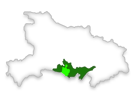 公安县在湖北省和荆州市中的位置。深绿为荆州市，浅绿为公安县。